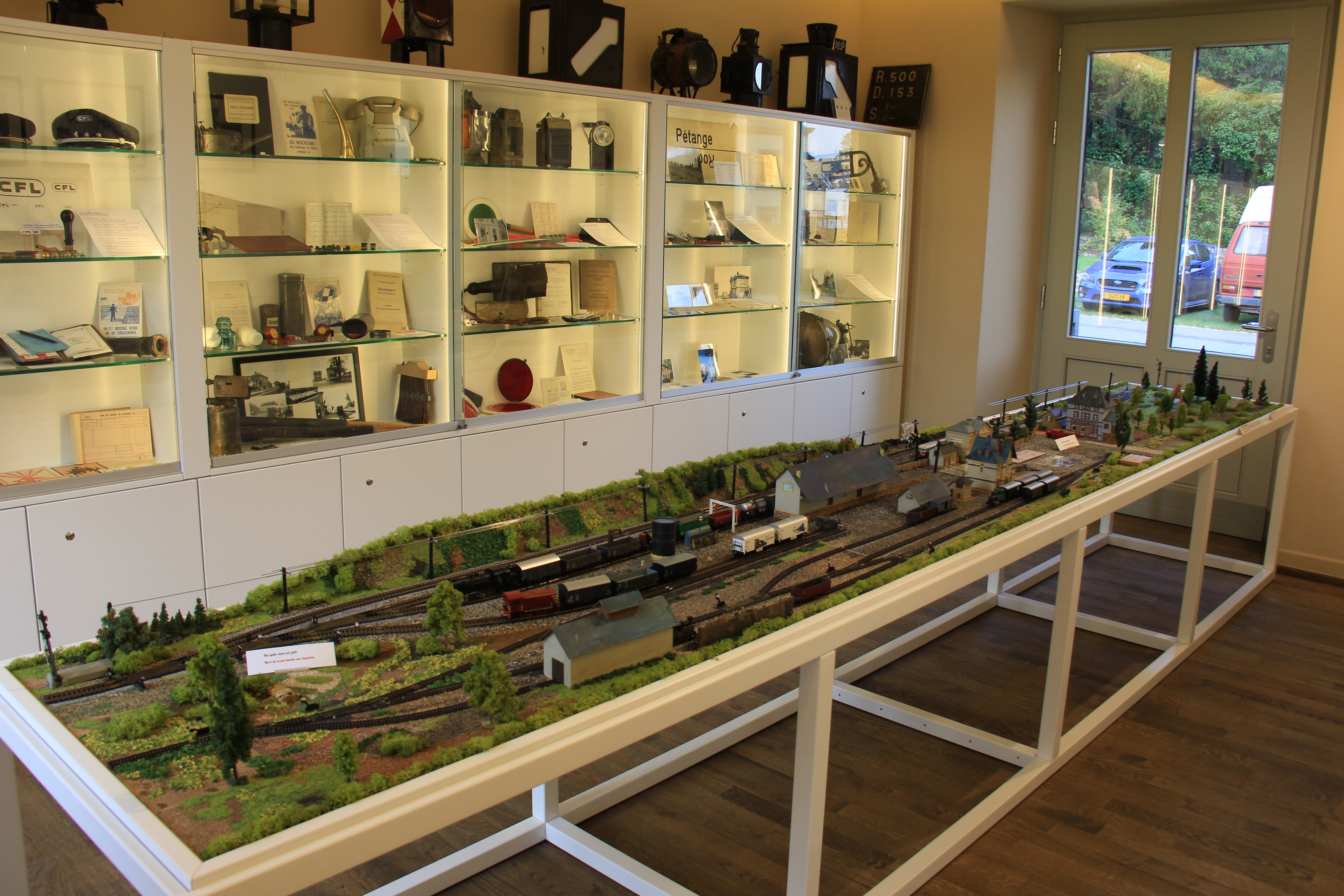 De rietse Sall vum Musée mat de Vitrinnen an der Maquette vun den 2 ale Garen